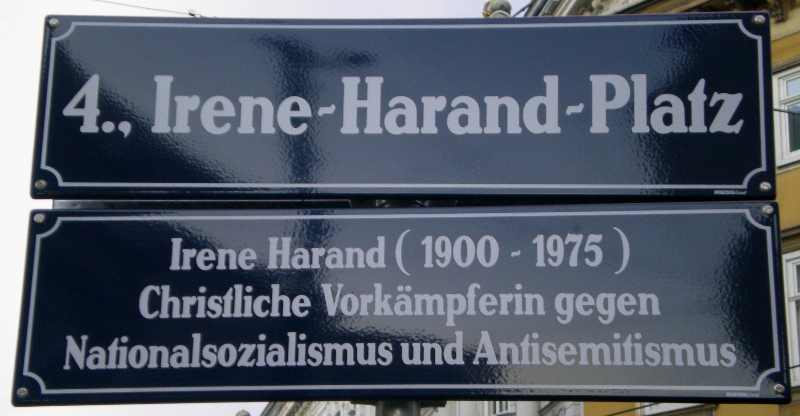 Straßentafel des neu benannten Irene-Harand-Platzes in Wien-Wieden